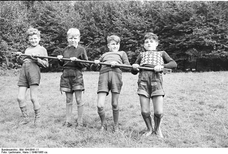 Stadtranderholung der Inneren Mission Düsseldorf